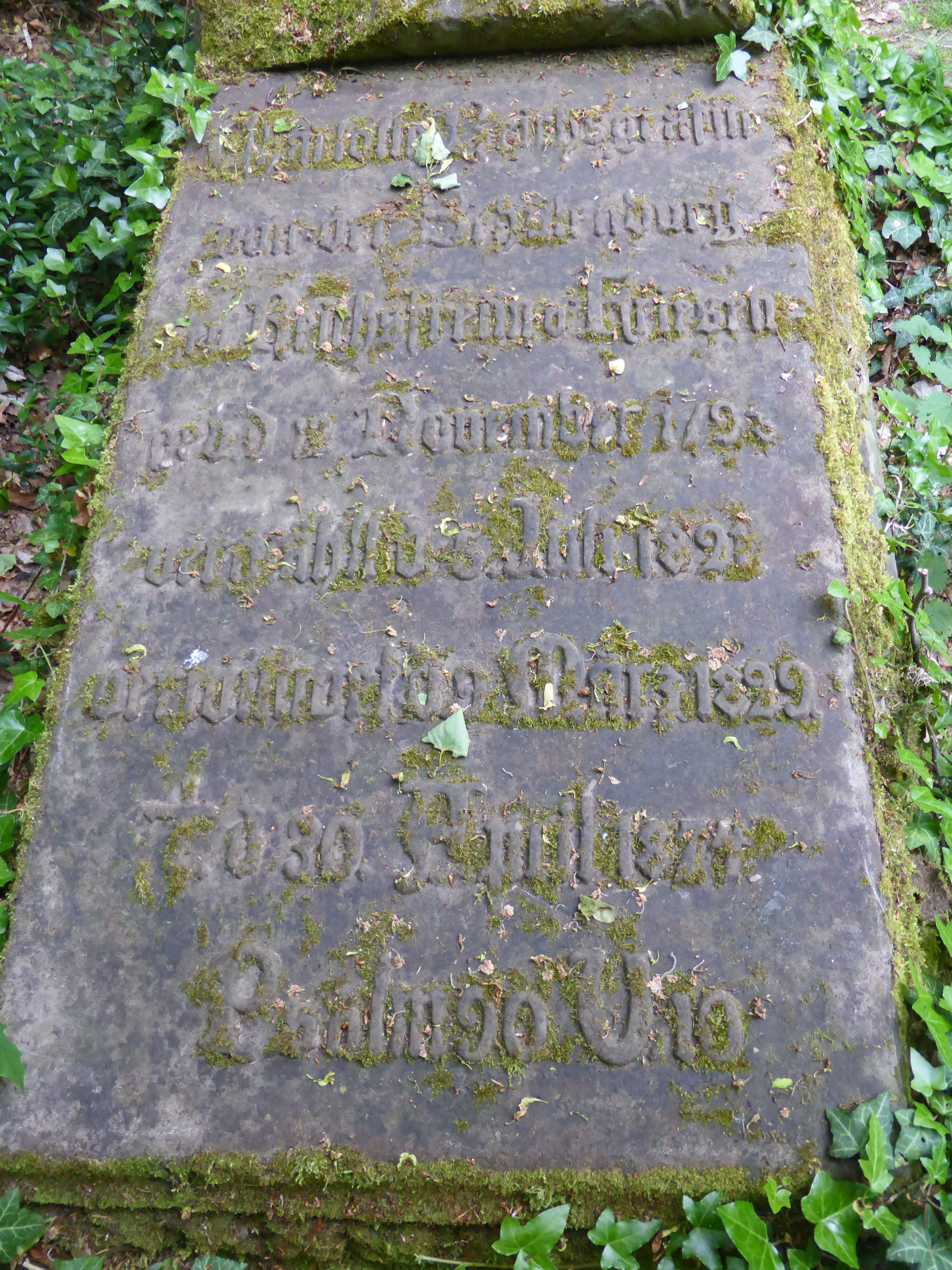 Grabstein von Charlotte Reichsgräfin von der Schulenburg, geb. Reichsfreiin von Friesen, auf dem Friedhof am Eiskuhlenberg bei Beetzendorf. Geboren am 12. November 1798 in Dresden, ⚭ 5. Juli 1821 mit Werner Graf von der Schulenburg-Nimptsch aus Beetzendorf, verwitwet 9. März 1829, † 30. April 1874.